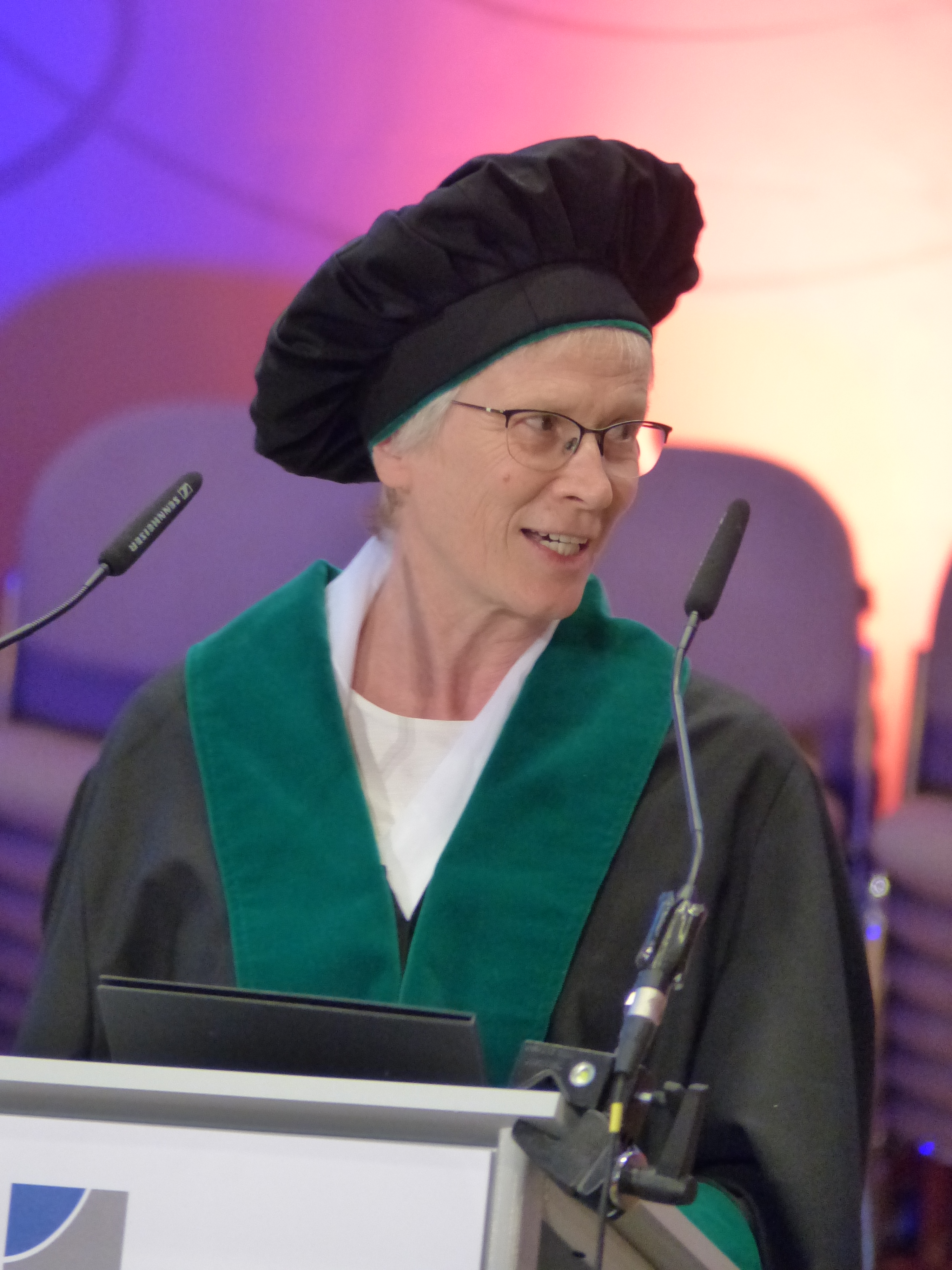 Karin Holm-Müller, Prorektorin der Universität Bonn, bei der feierlichen Eröffnung des Akademischen Jahres 2019/20